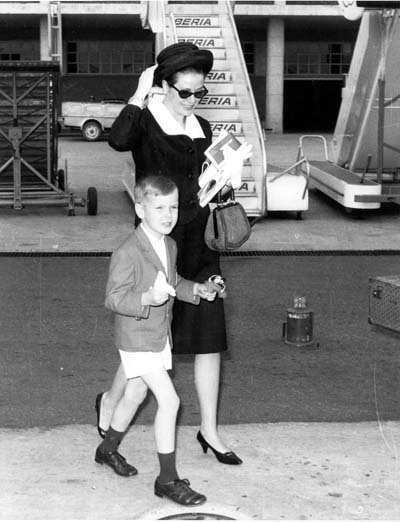 Grace Kelly y Alberto de Mónaco 1964. Llegando al aeropuerto de Madrid-Barajas